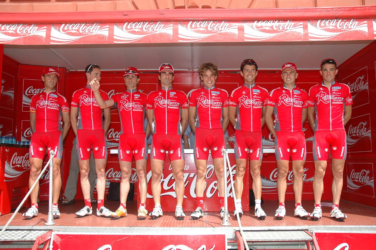 Relax-Gam